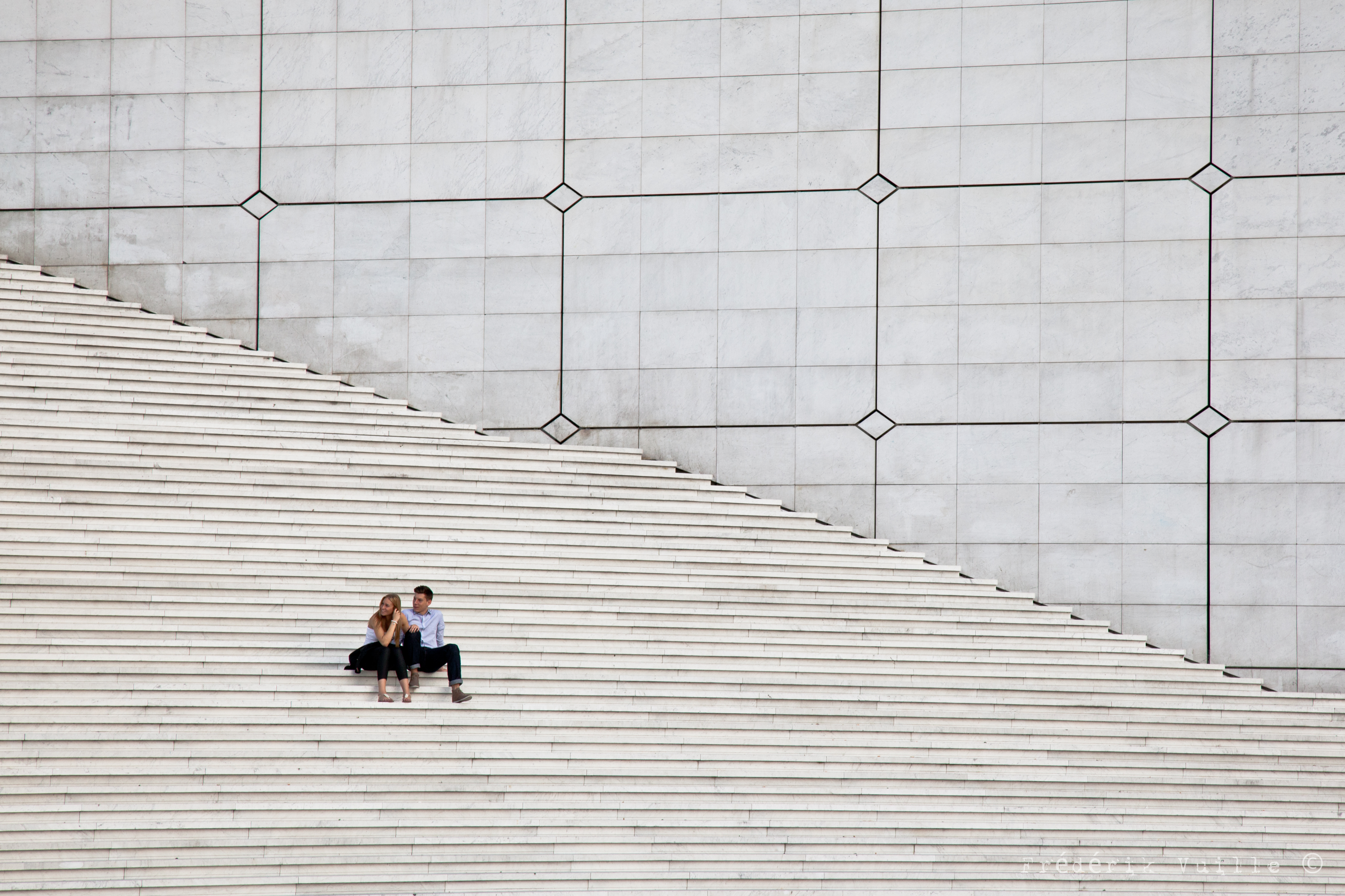 Grande Arche, La Défense, France.